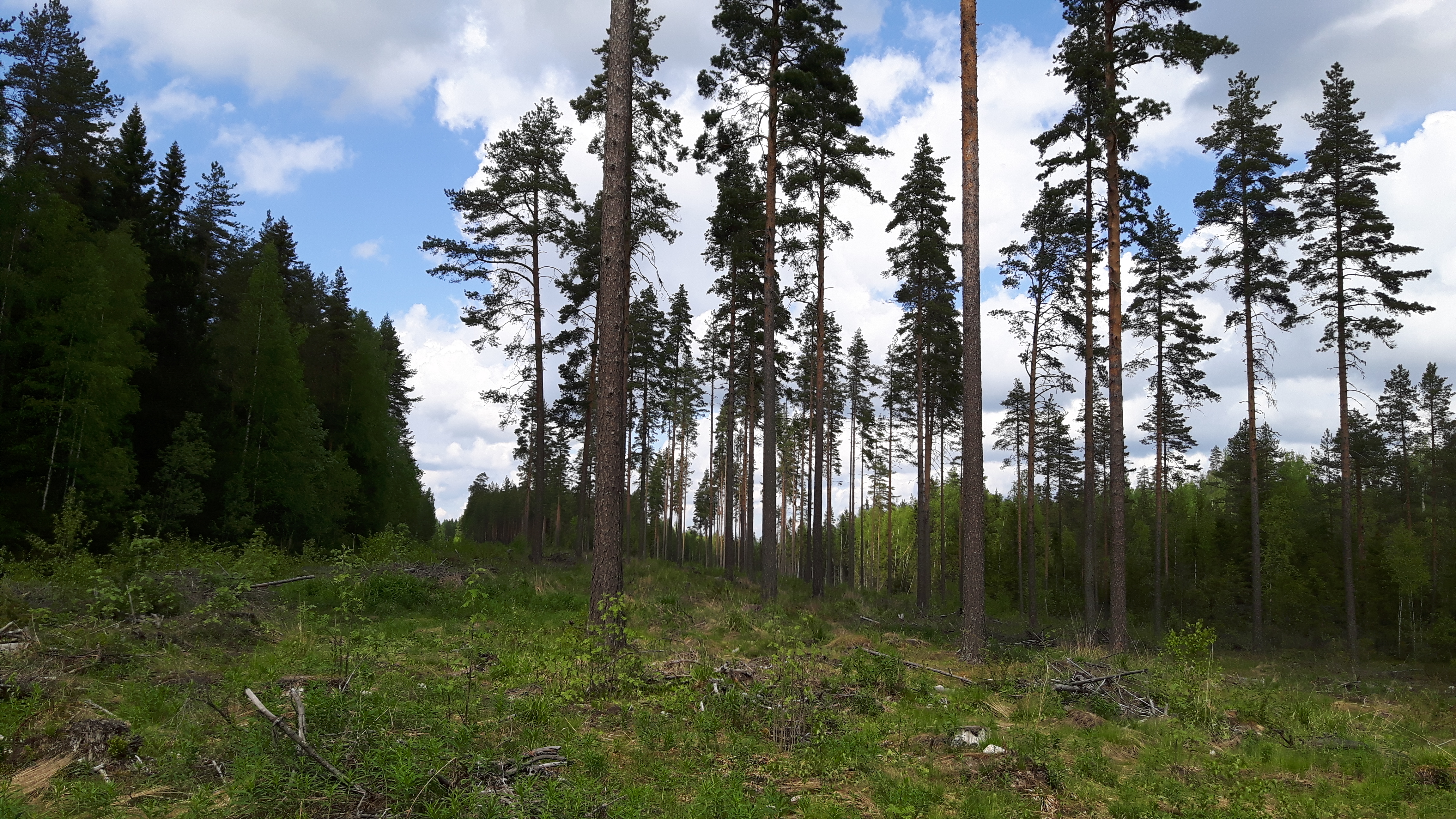 Kuva suomalaisesta metsästä, jossa on tehty avohakkuu (päätehakkuu). Kuvassa näkyy PEFC-sertifioinnin mukaisia säästöpuita.